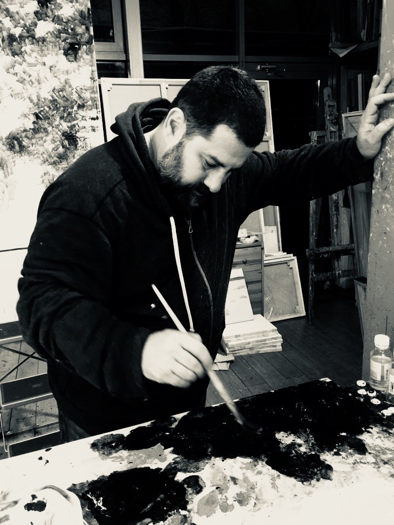 Photo de Georgy Georgevitch Totibadze